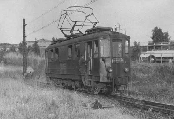 Motrice in entrata a Zagarolo Scalo, sulla ferrovia Roma-Fiuggi-Alatri-Frosinone.